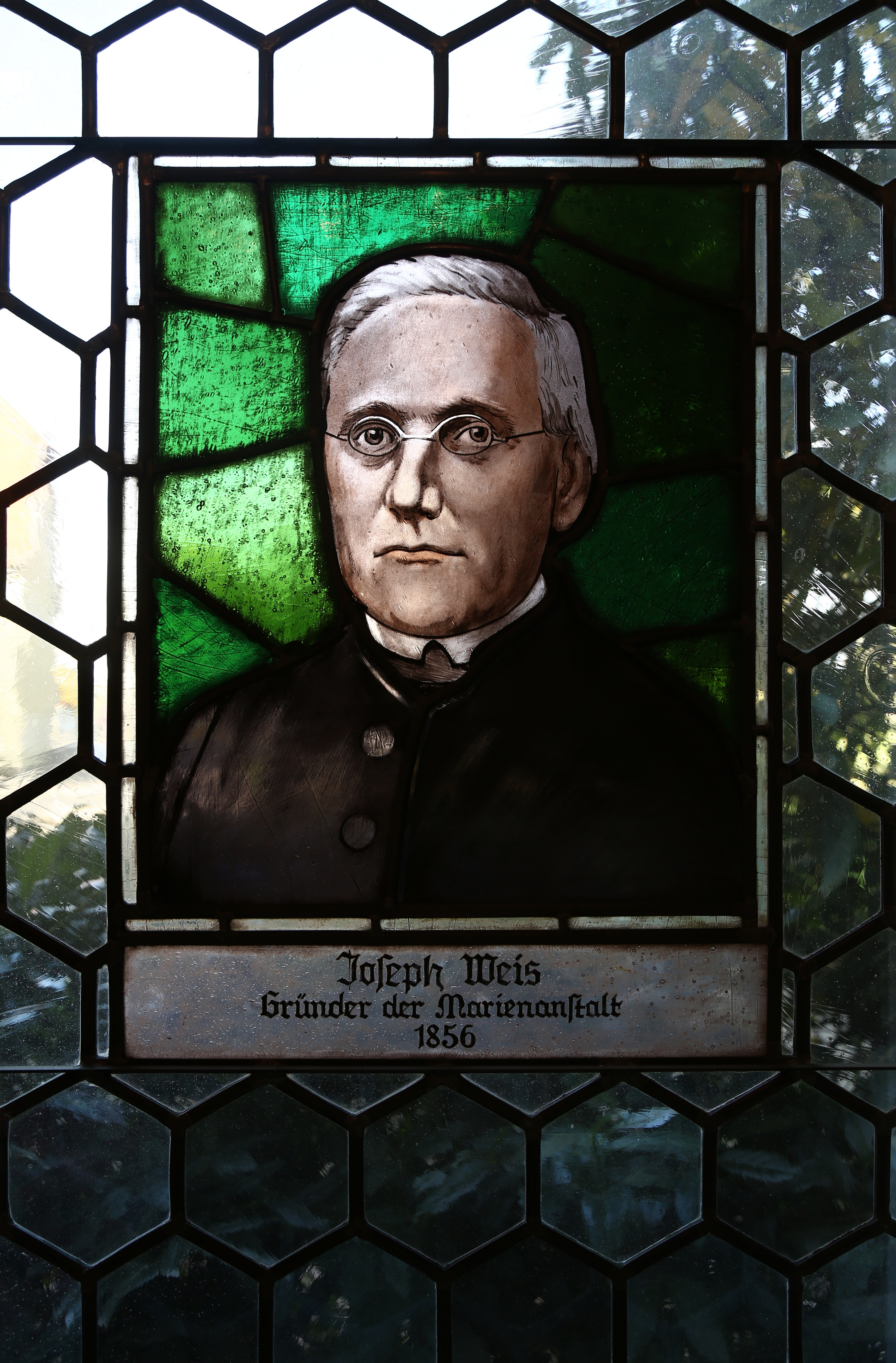 Gut Warnberg in München-Solln. Auf den Gelände eines historischen Gutes befinden sich die Marienanstalt Warnberg, die Privatschule Gut Warnberg, ein Reitstall und weitere Gebäude. Glasbild des Gründers der Marienanstalt, Joseph Weis (1817-1895)